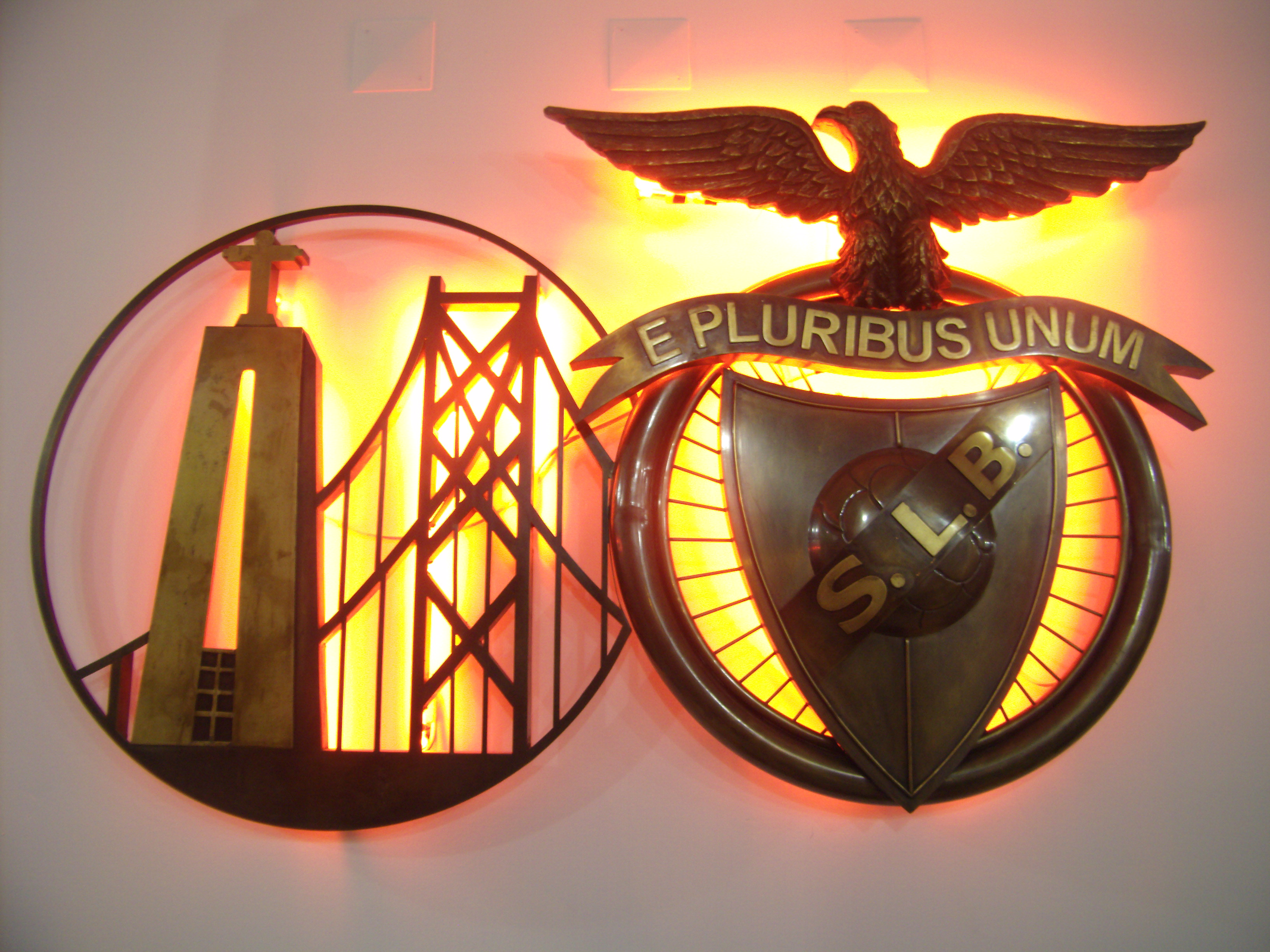 Casa do Benfica de Almada, Almada, Setúbal, Portugal.